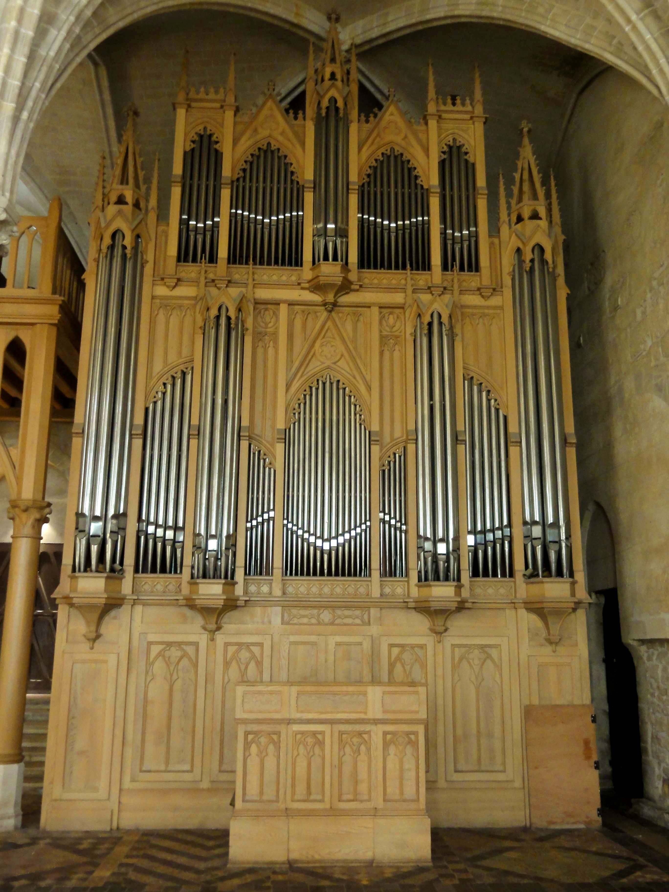 Réfectoire des moines - voir titre.